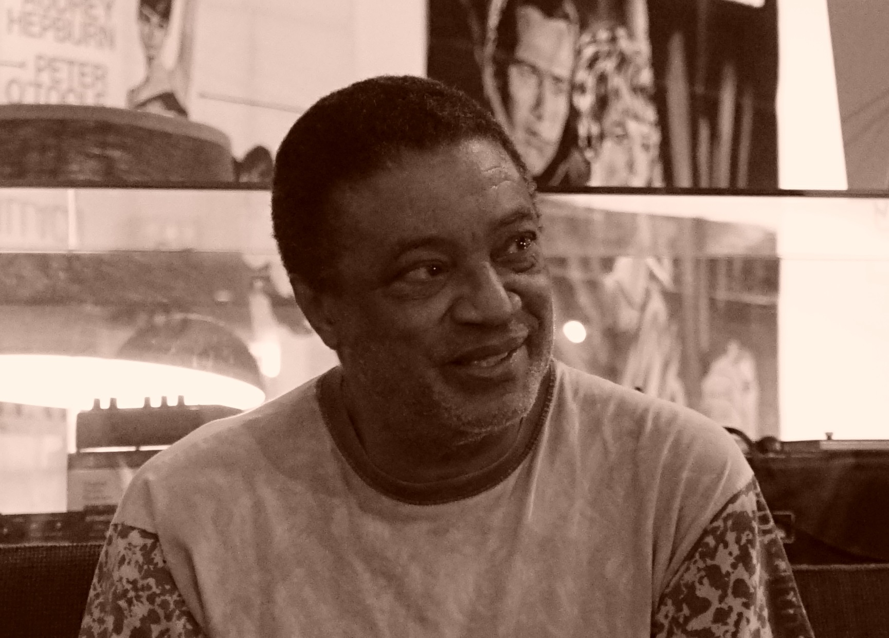 Conférence à Reims, médiathèque Croix-Rouge.